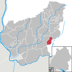 Hasel, Landkreis Lörrach, Baden-Württemberg